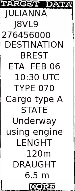 AIS maritime